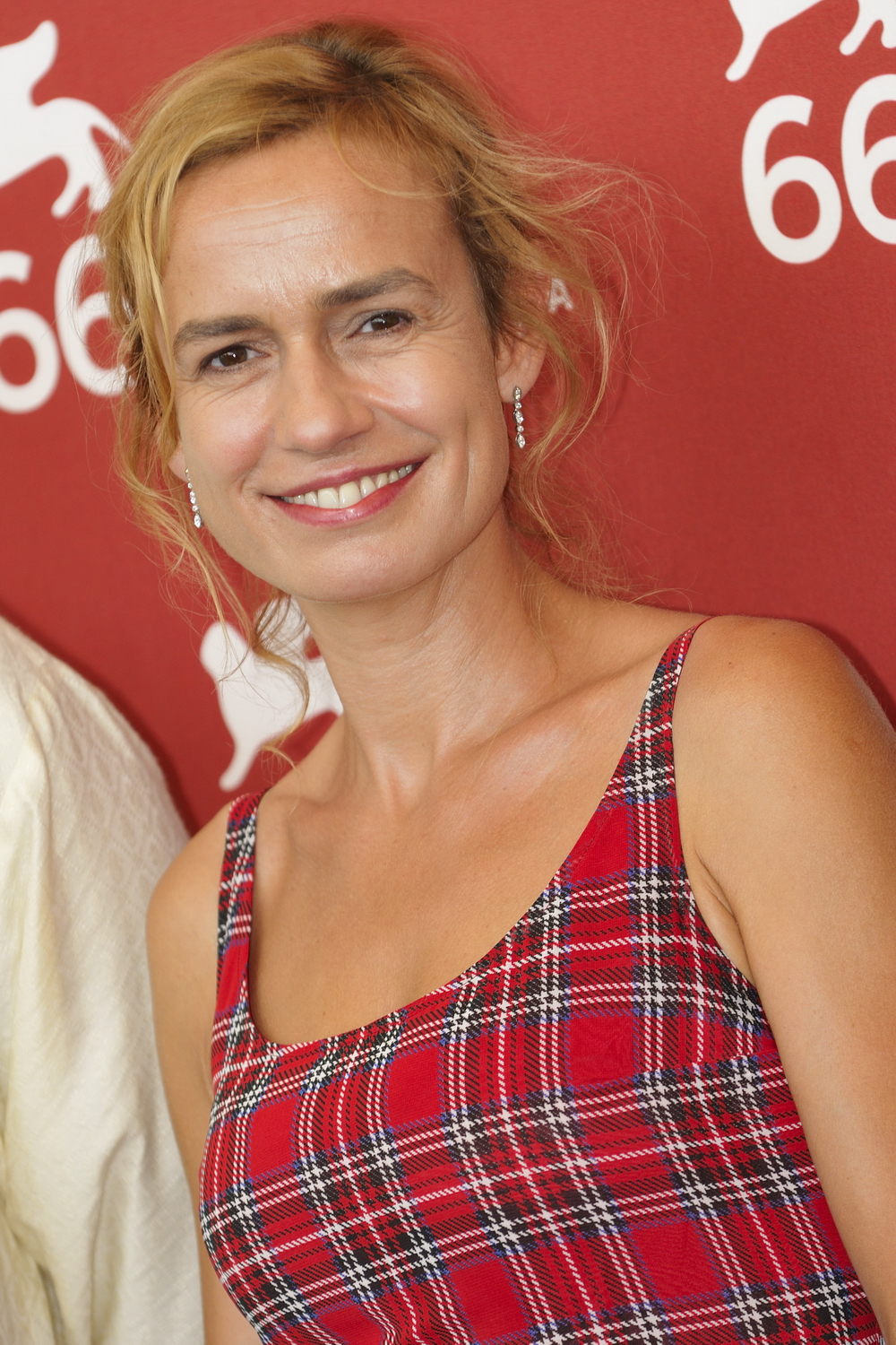 Sandrine Bonnaire pour le Photocall avec le jury du Festival. 66ème Festival du Cinéma de Venise (Mostra), 2ème jour (03/09/2009)